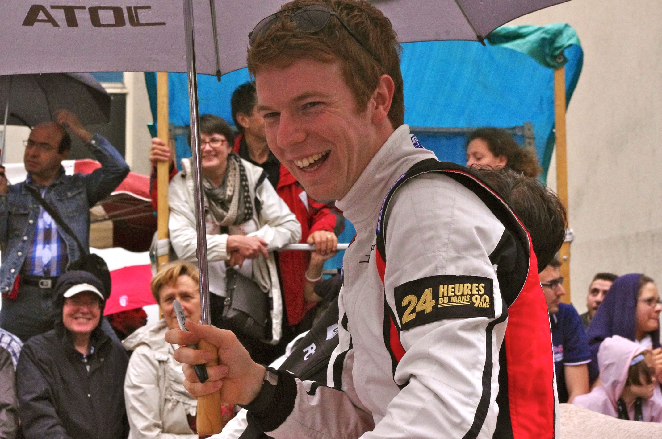 Drivers' Parade Le Mans 24 Hours 2013